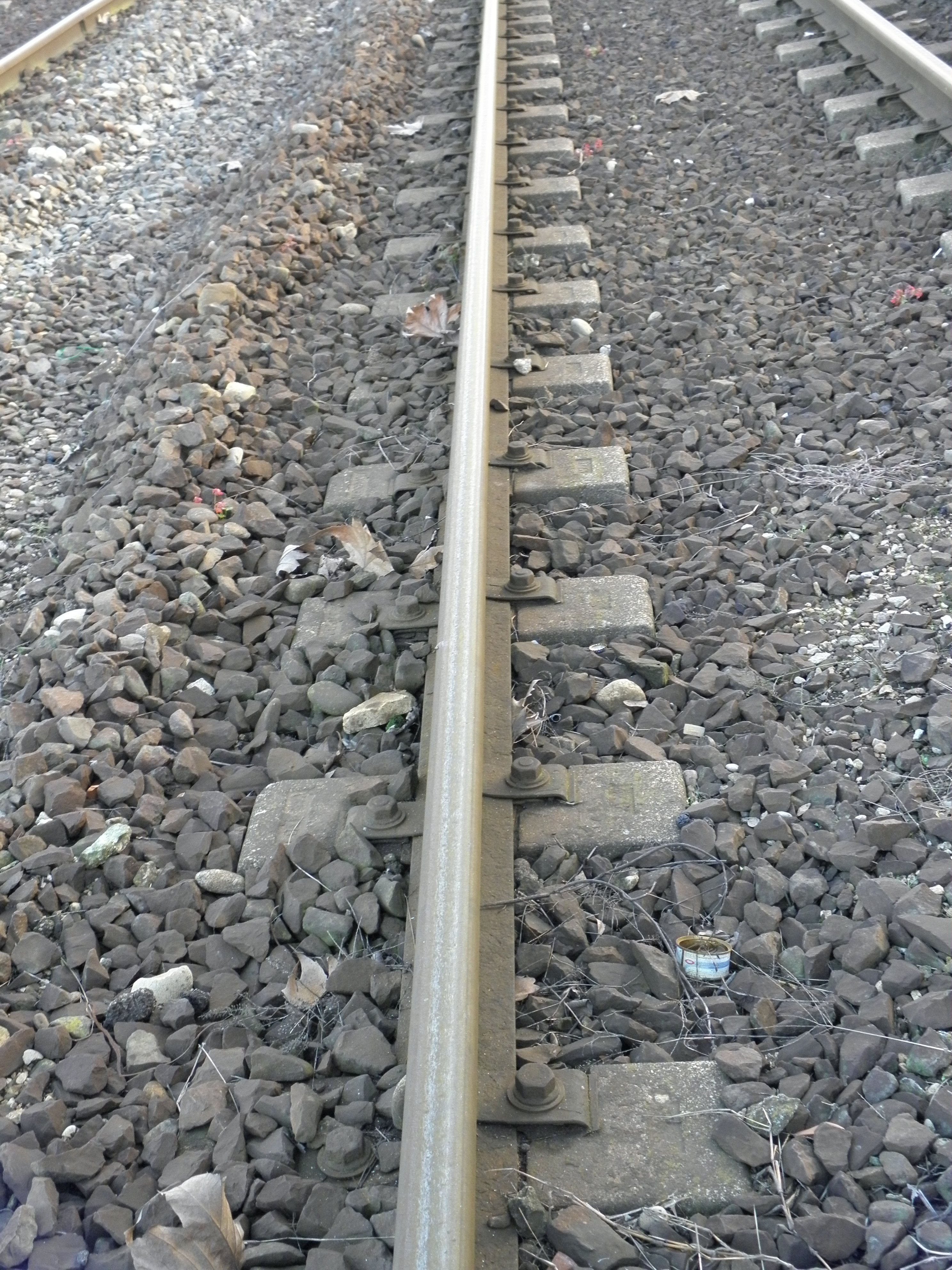 Stazione di Rovereto-San Vito-Medelana, dettaglio binario con traversina.